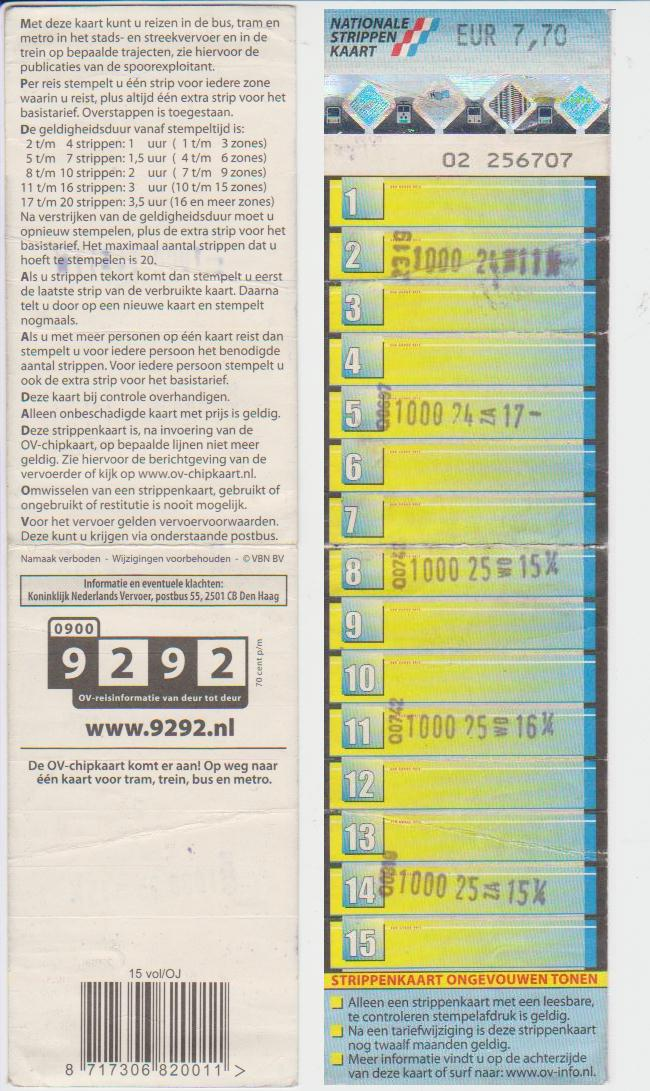 Strippenkaart model: 2011.